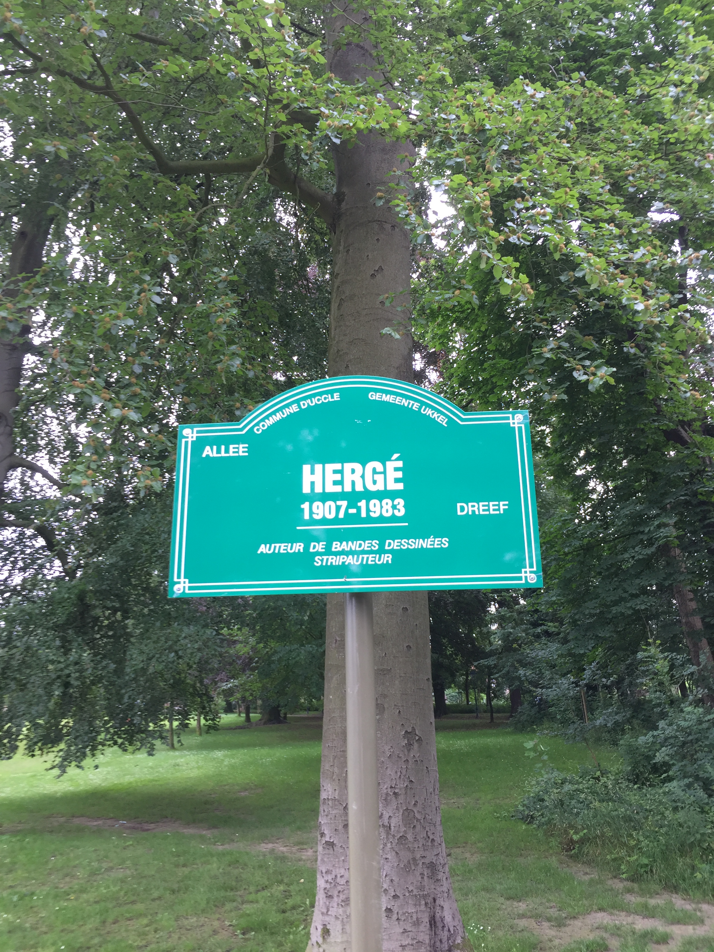 Hergé (1907-1983)